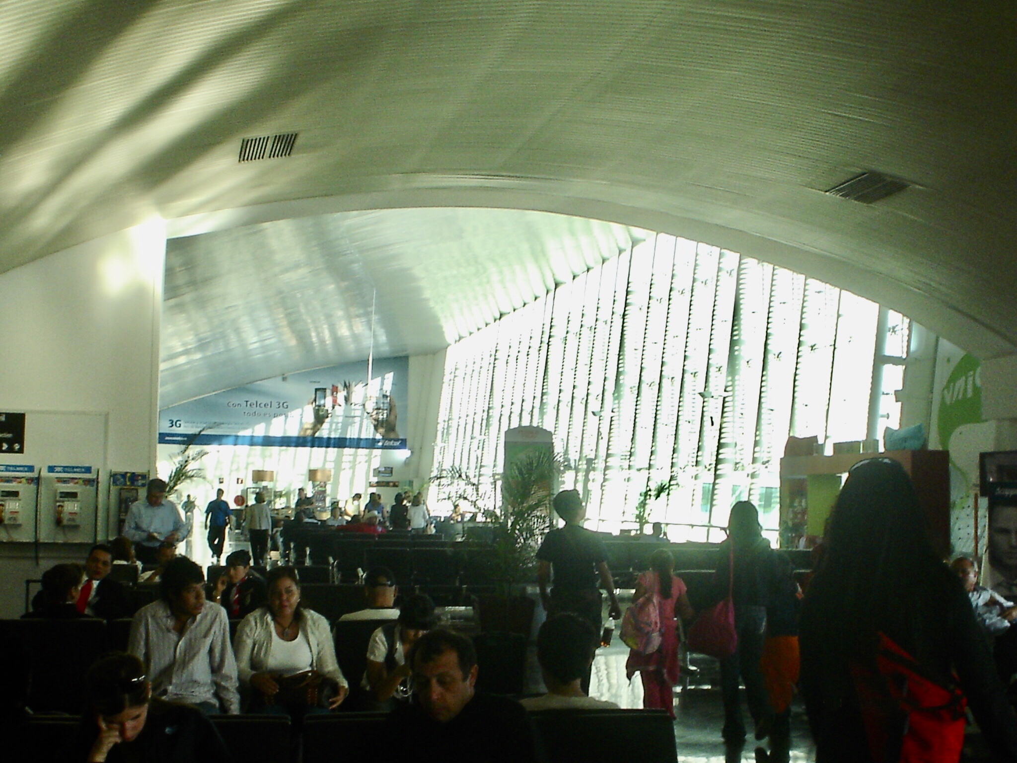 Salas de Ultima Espera del Aeropuerto de Guadalajara